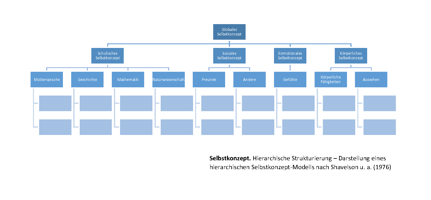 Das hierarchische Modell von Shavelson u. a. beschreibt das Selbstkonzept als eine mehrdimensionale, hierarchische Ordnung.